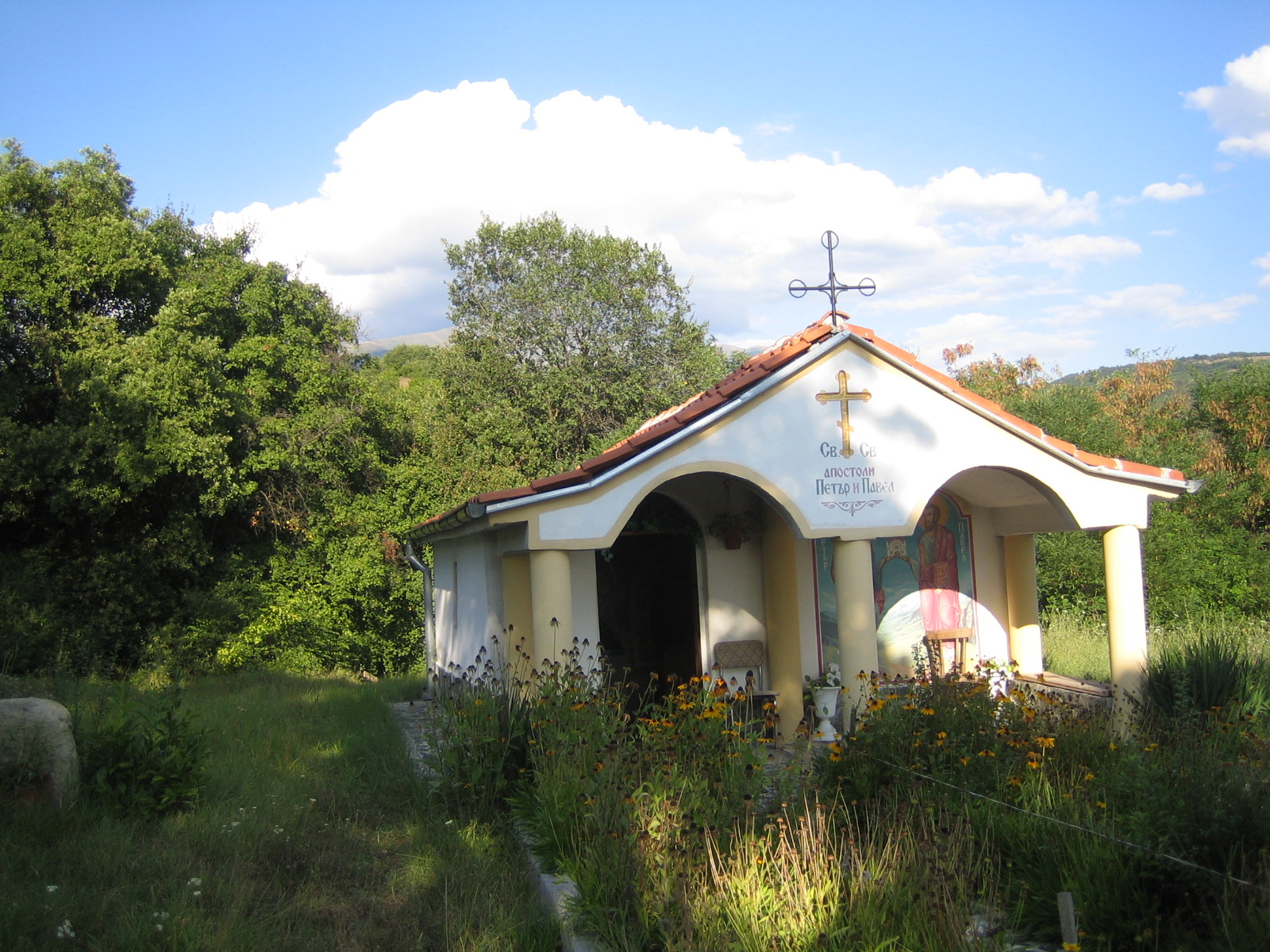 Параклис "Св. Петър и Св. Павел"